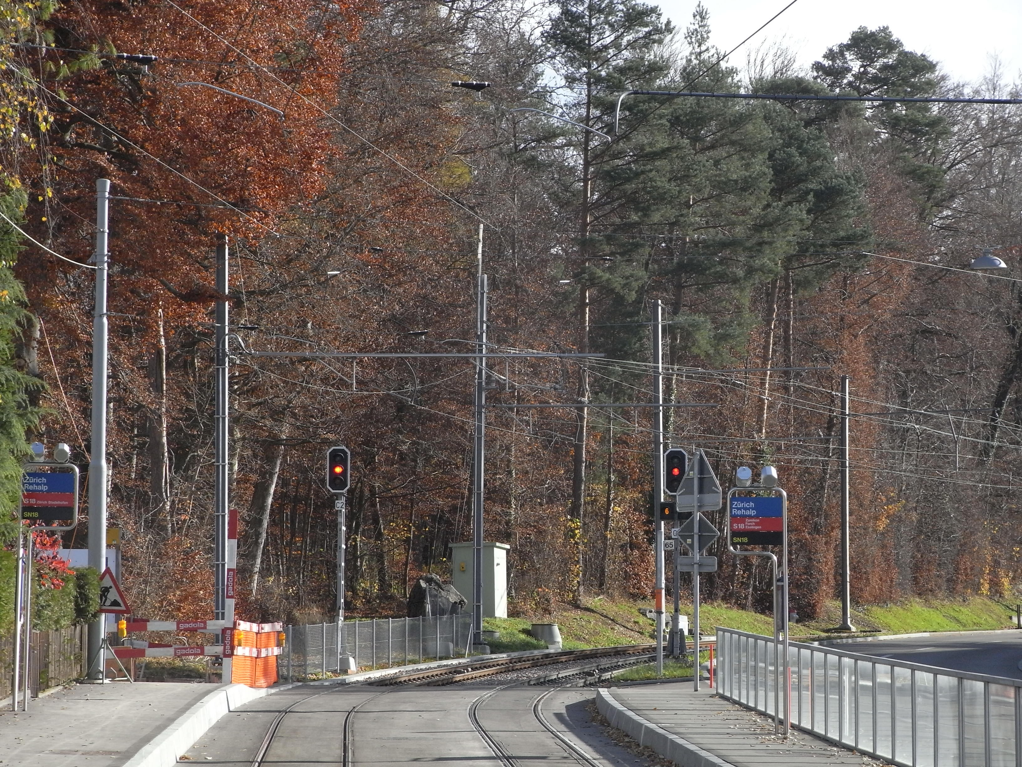 Bahnsteige der Forchbahn in Zürich, Station Rehalp